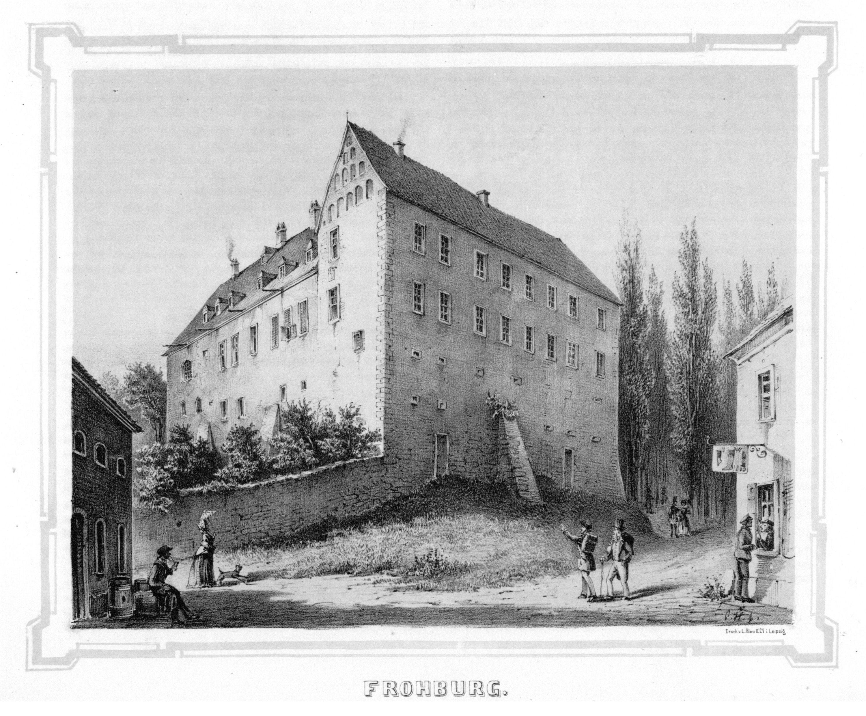 Frohburg aus: Album der Rittergüter und Schlösser im Königreiche Sachsen Leipziger Kreis Section: I